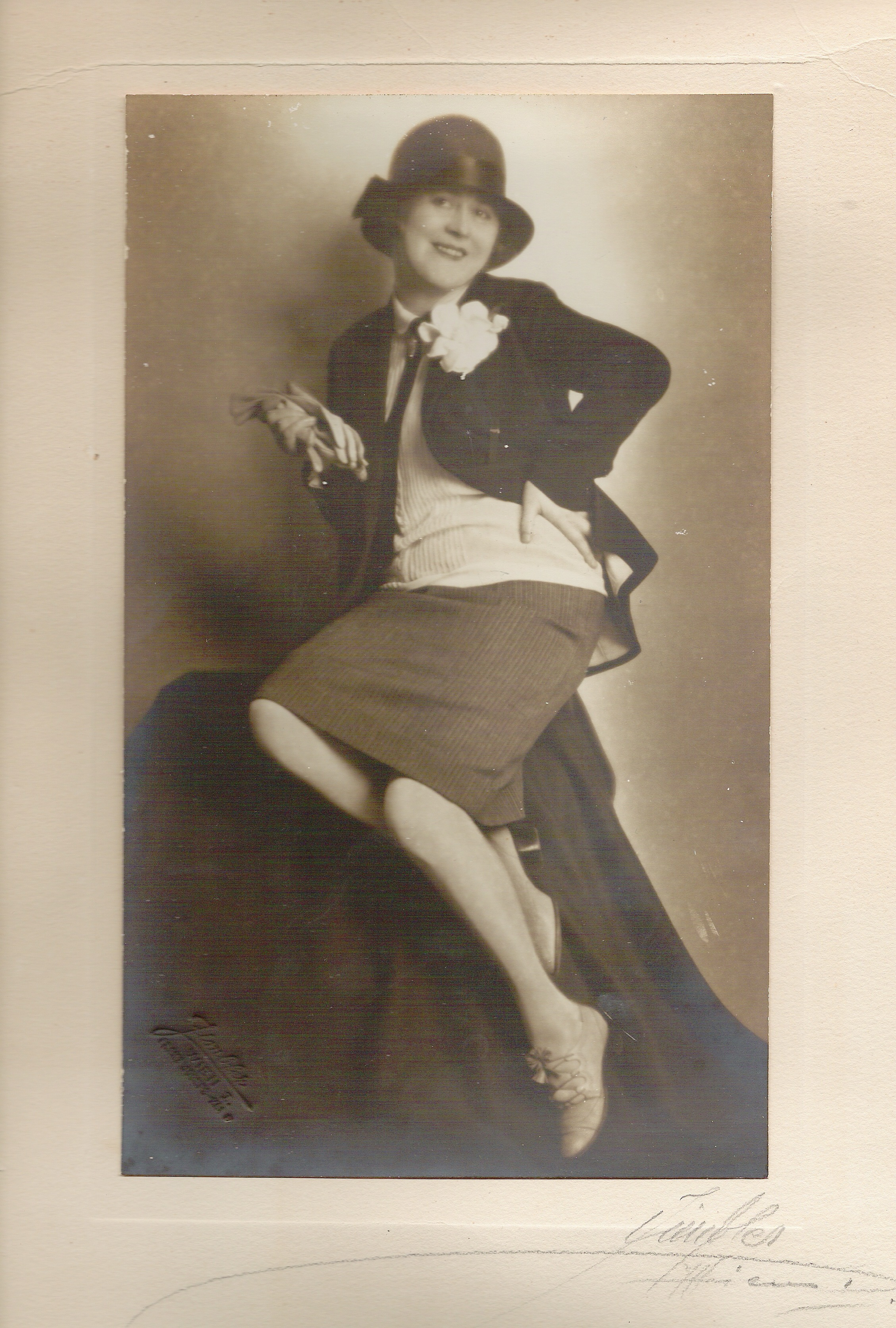 מתוך ההצגה "דודה פרידה: מוזיאון", מאת ובבימויה של נעמי יואלי